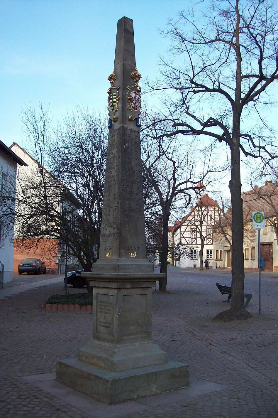 Kursächsische Postdistanzsäule am Markt in Brehna